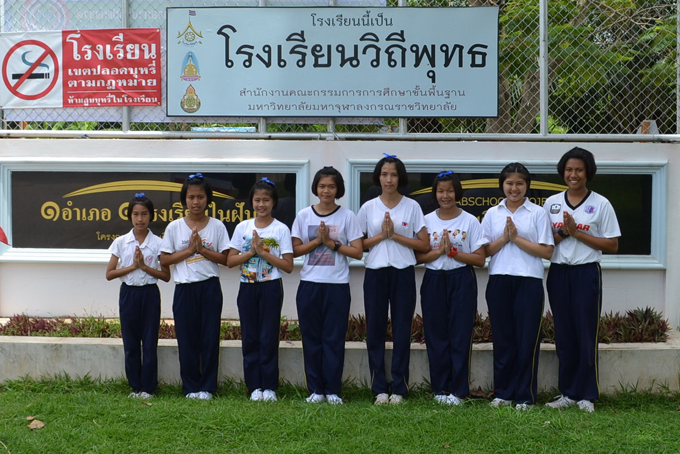 โรงเรียนวิถีพุทธ โรงเรียนบ้านหนองกะท้าว อ.นครไทย จ.พิษณุโลก